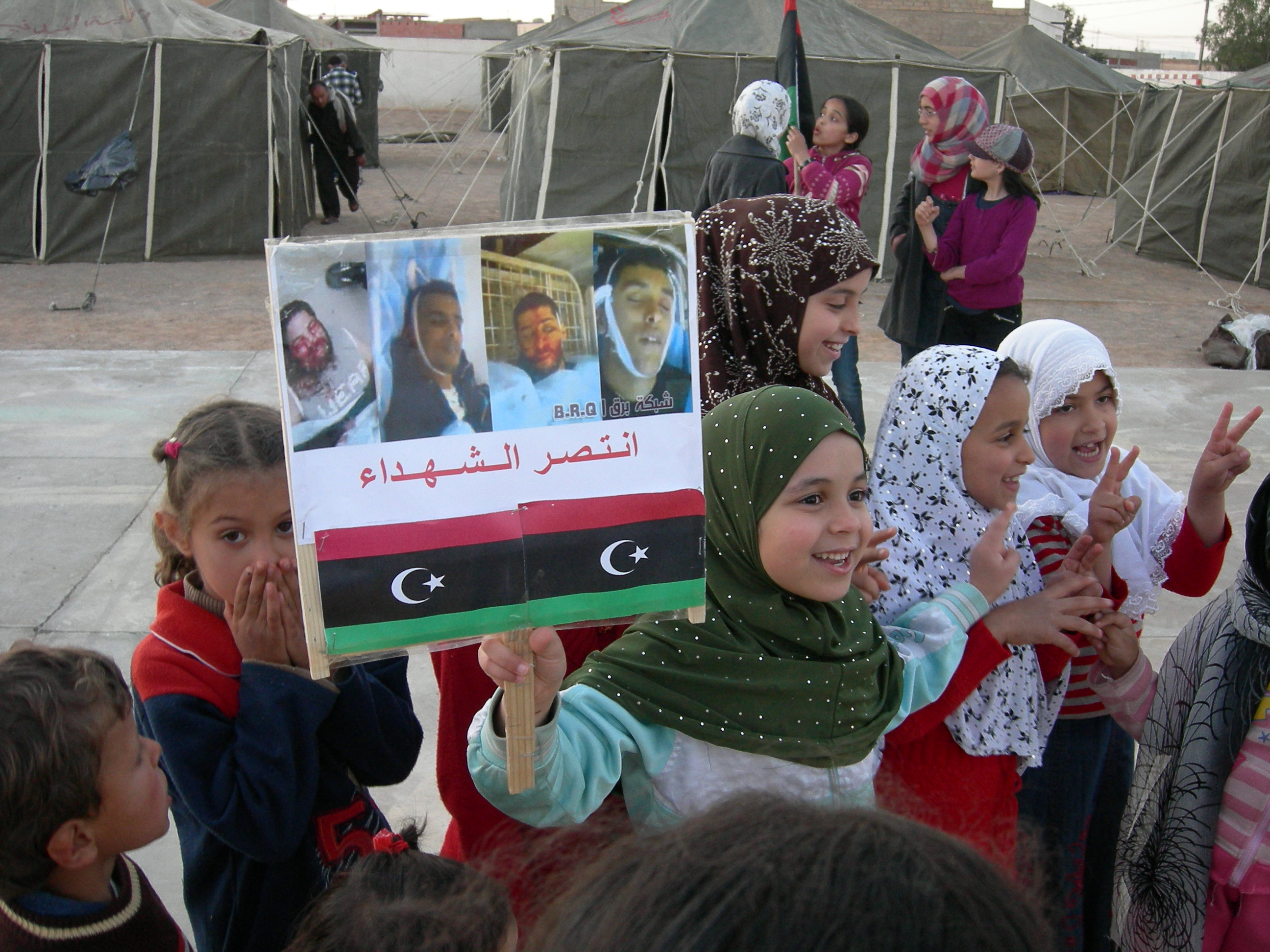 [Houda Trabelsi] Libyan children at a refugee camp hold up a sign with revolutionary slogans. أطفال ليبيون في مخيم للاجئين يحملون لافتات كُتبت عليها شعارات ثورية. Des enfants libyens dans un camp de réfugiés brandissent des slogans révolutionnaires. Full story: القصة L'article